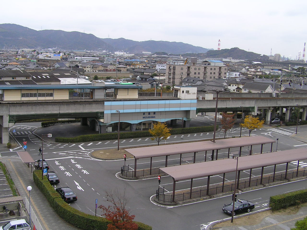 水島駅前ロータリー / Mizushima Station in Okayama prefecture